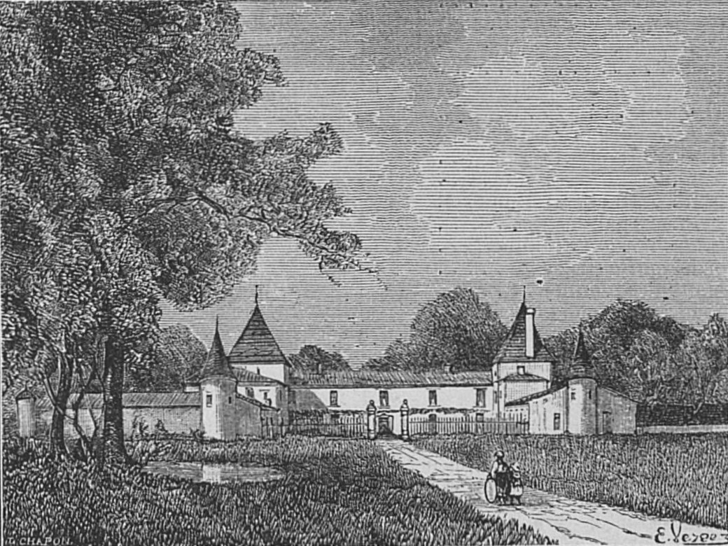 Illustration du Château Suduiraut dans l'ouvrage Bordeaux et ses vins (6ème édition) de Charles Cocks et Edouard Féret publié en 1893